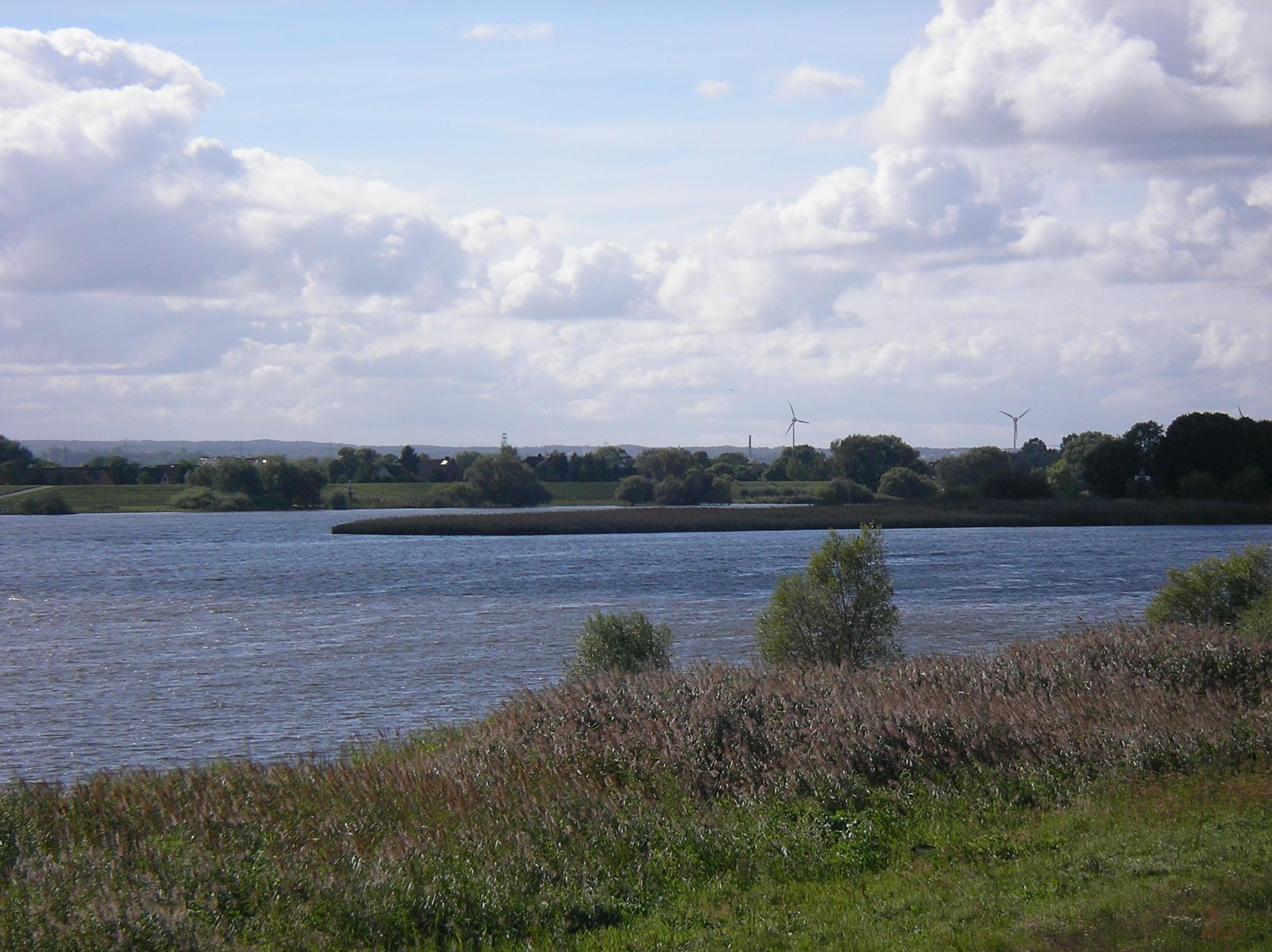 Blick auf die Bunthäuser Spitze in Wilhelmsburg, wo sich Norder- und Süderelbe trennen.